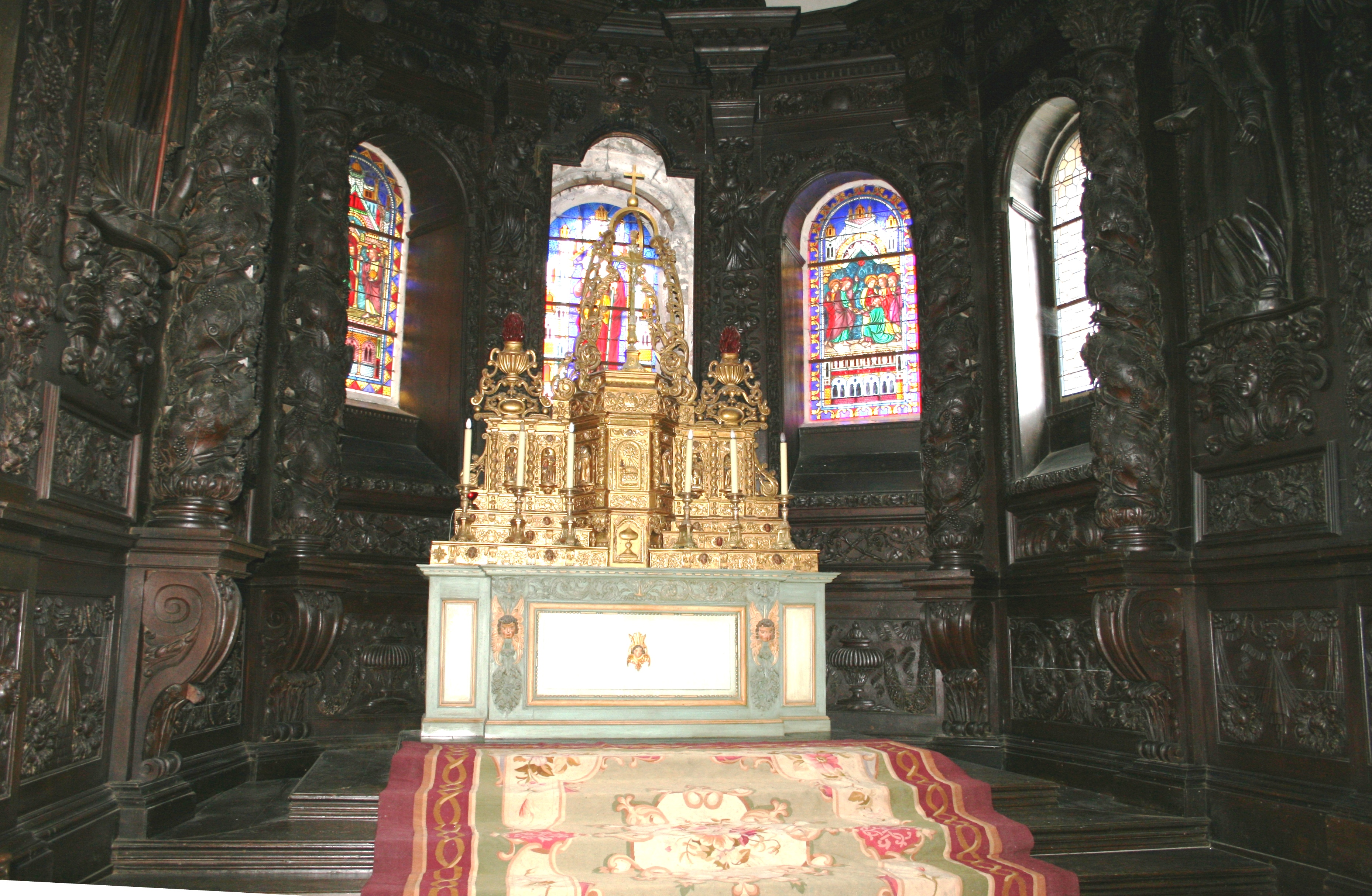 Boiseries XVIIe siècle et autel de l'église d'Ahun, Creuse, France